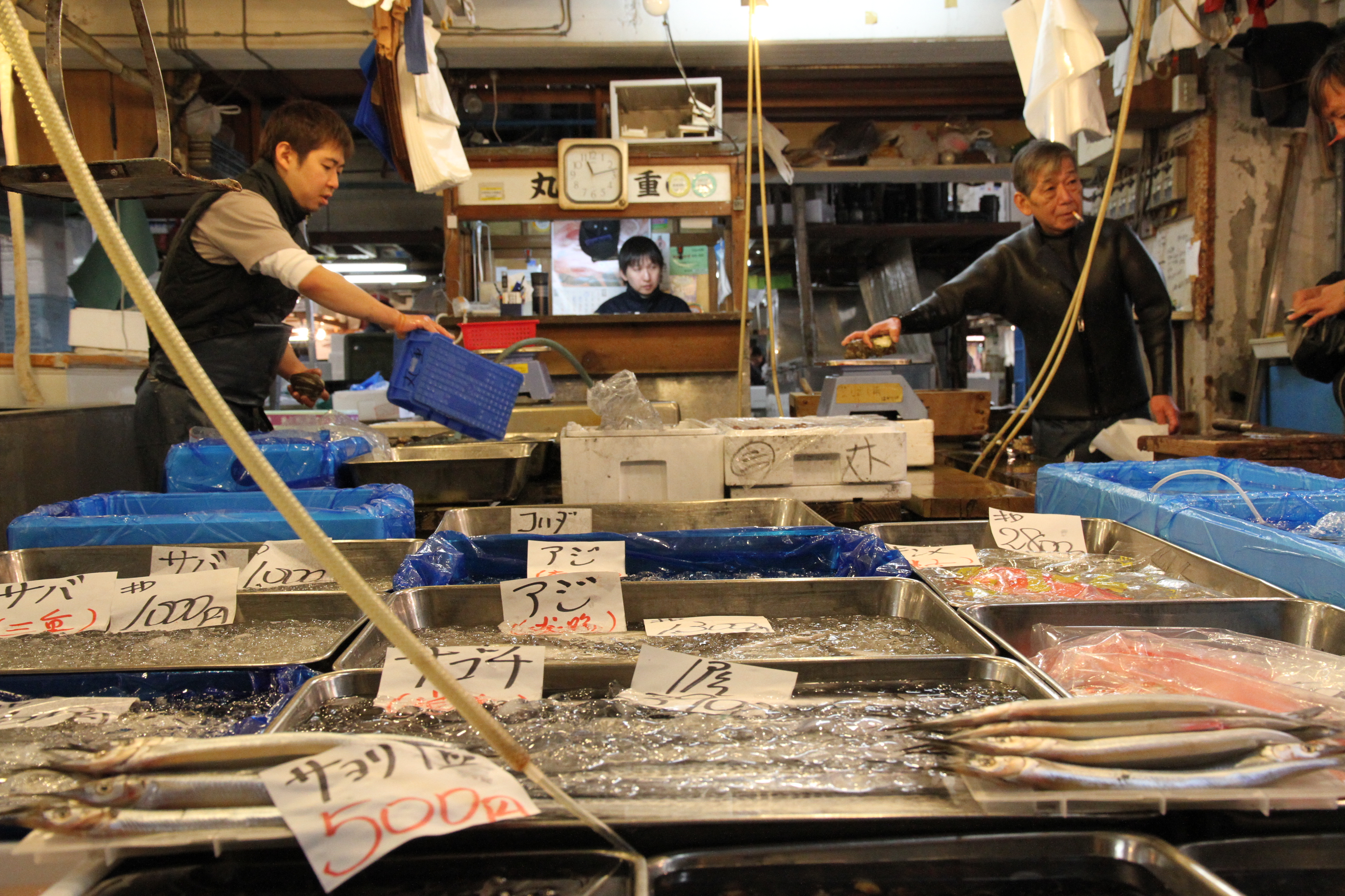 Japon / Novembre 2012